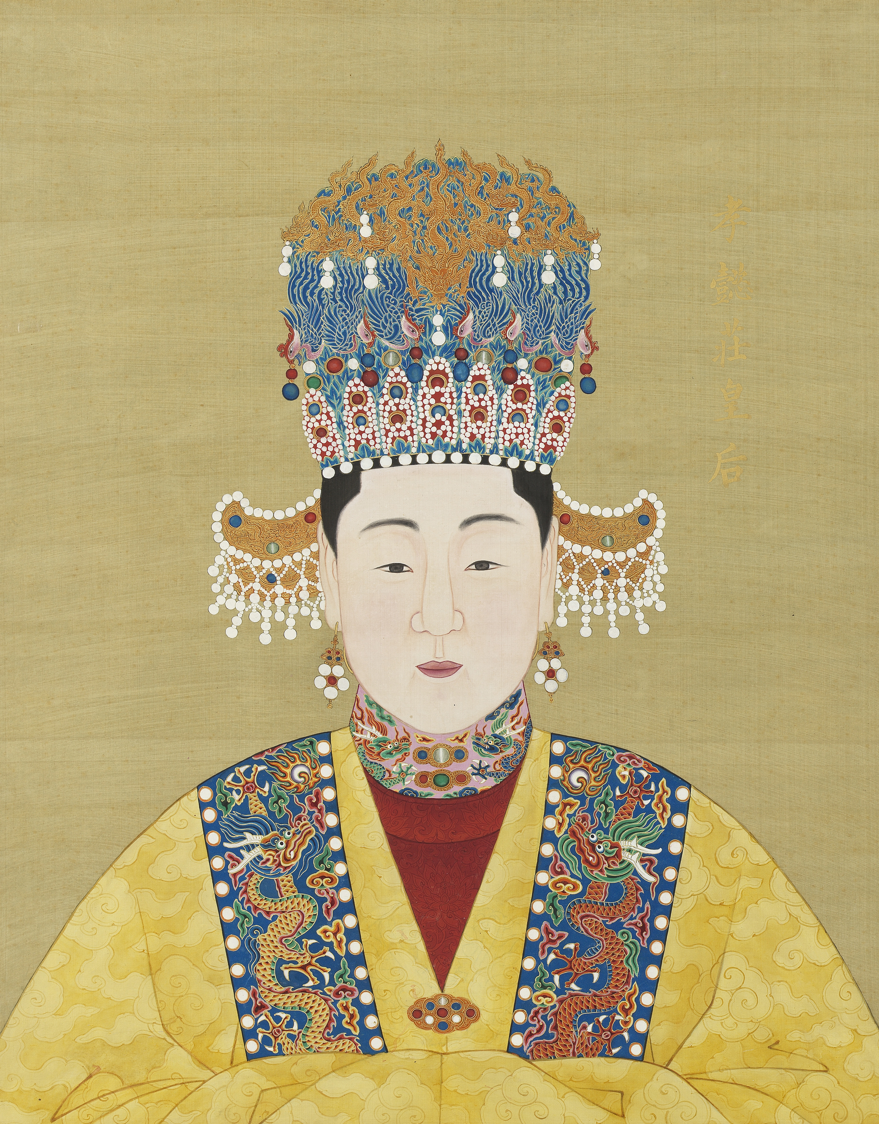 中文（中国大陆）: 作者已经去世超过200年，作品已经进入公有领域。